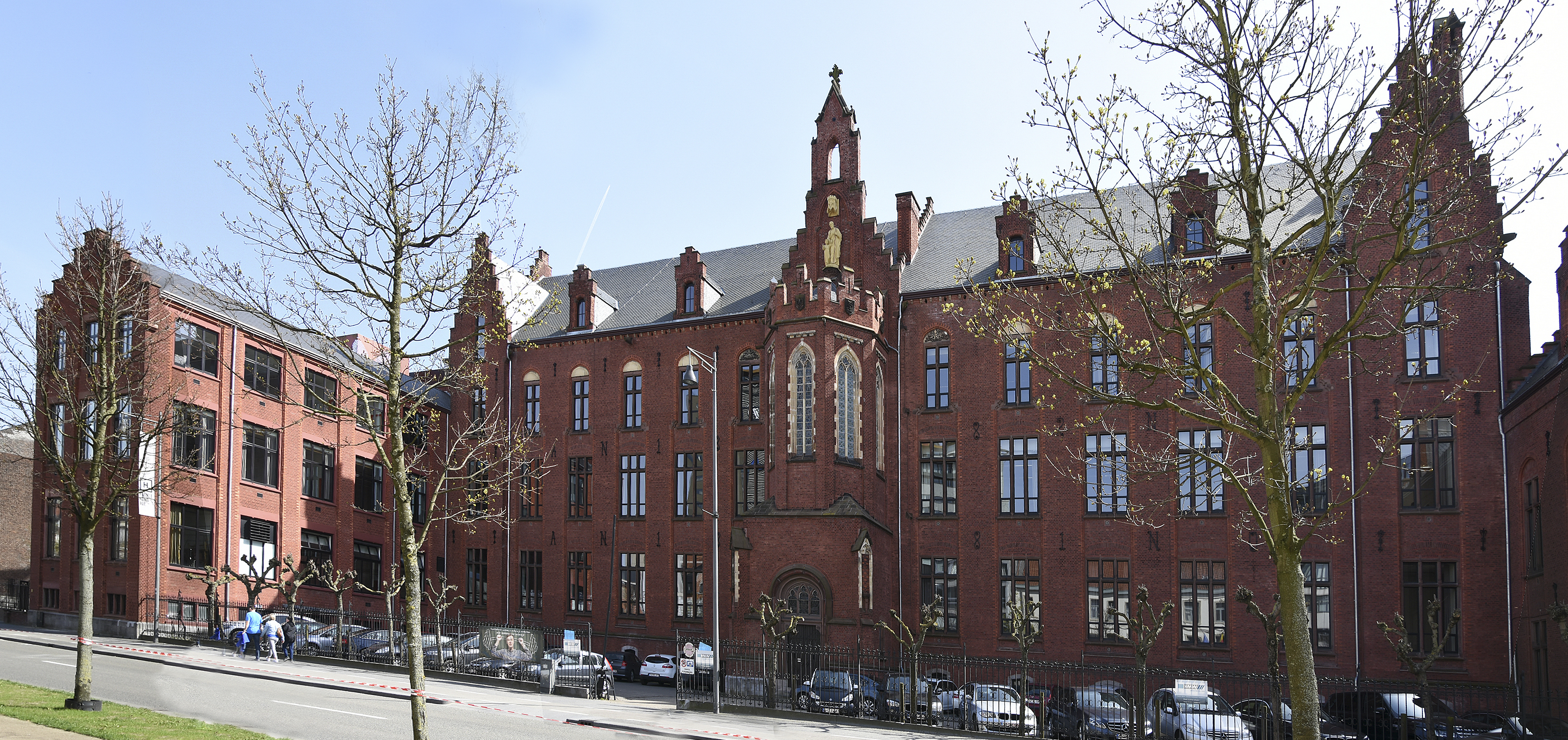 Sint-Jozefscollege Hasselt, België